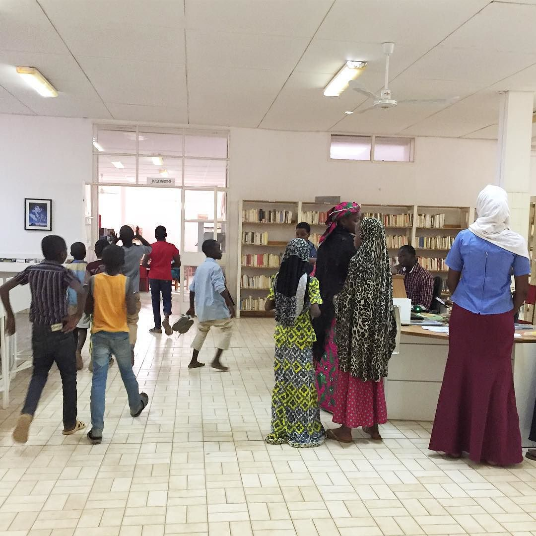 via Instagram ift.tt/2iSmBiM